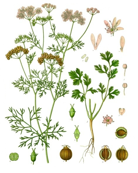 Echter Koriander. A B Pflanze in natürl. Grösse; 1 Scheibenblüthe, vergrössert; 2 Randblüthe, desgl.; 3 Kronblatt der Scheibenblüthe, desgl.; 4 Kronenblätter der Randblüthe, mittleres und seitliches, desgl.; 5 Staubgefäss, desgl.; 6 Pollen; desgl.; 7 u. 8 Fruchtknoten mit Kelch, desgl.; 9 dieselbe Figur im Längsschnitt; 10 Fruchtknoten im Querschnitt, desgl.; 11 Frucht, desgl.; 12 Theilfrüchtchen, von der Fugenseite, desgl.; 13 Frucht im Längsschnitt, desgl.; 14 dieselbe im Querschnitt, desgl.